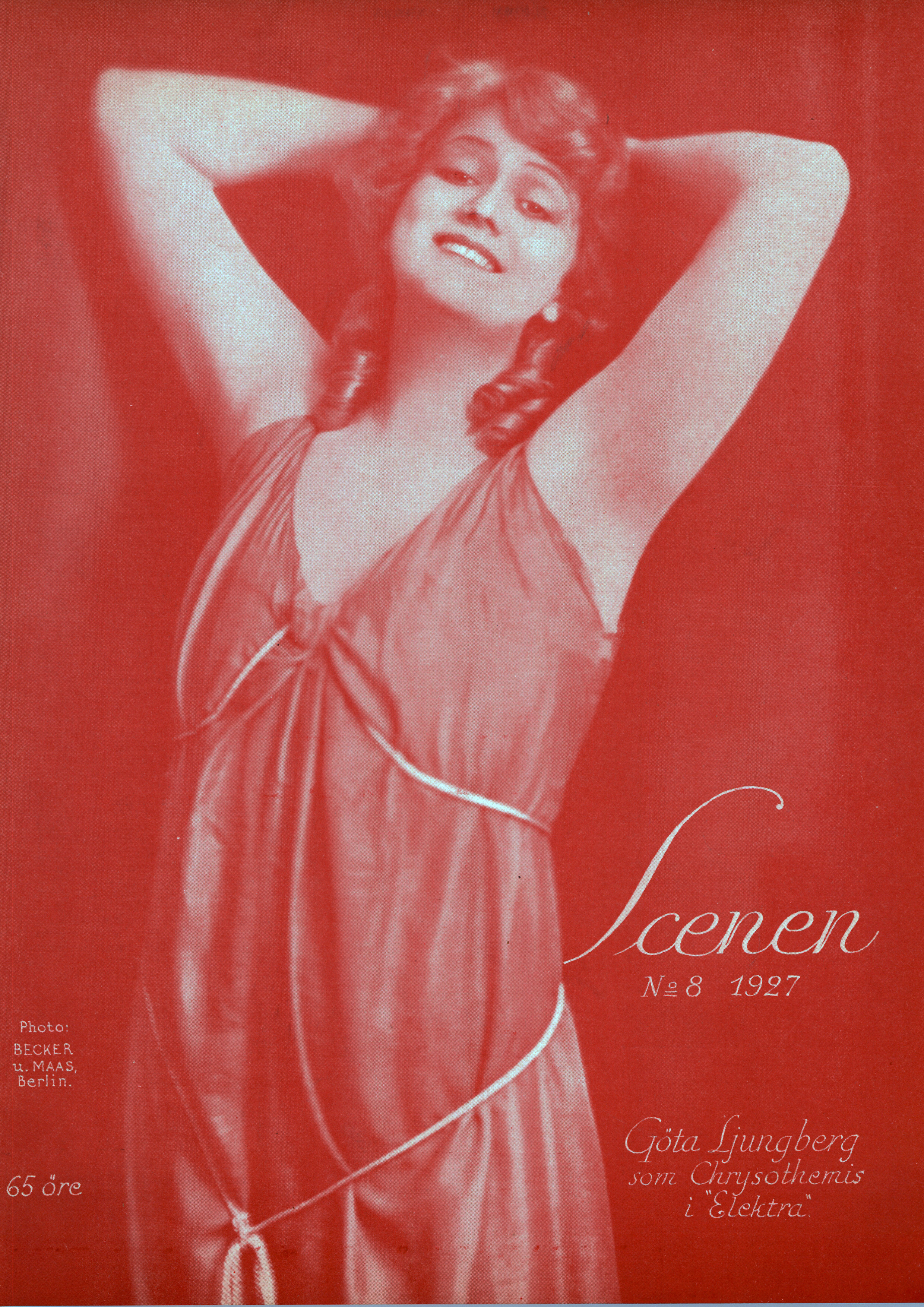 Göta Ljungberg (1893-1955) som Chrysothemis i Elektra. (Omslag till Scenen 1927).